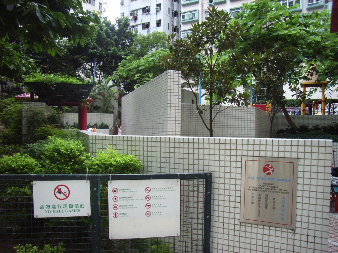 (User:Hillo STT 618) Hill Road, Shek Tong Tsui, Hong Kong